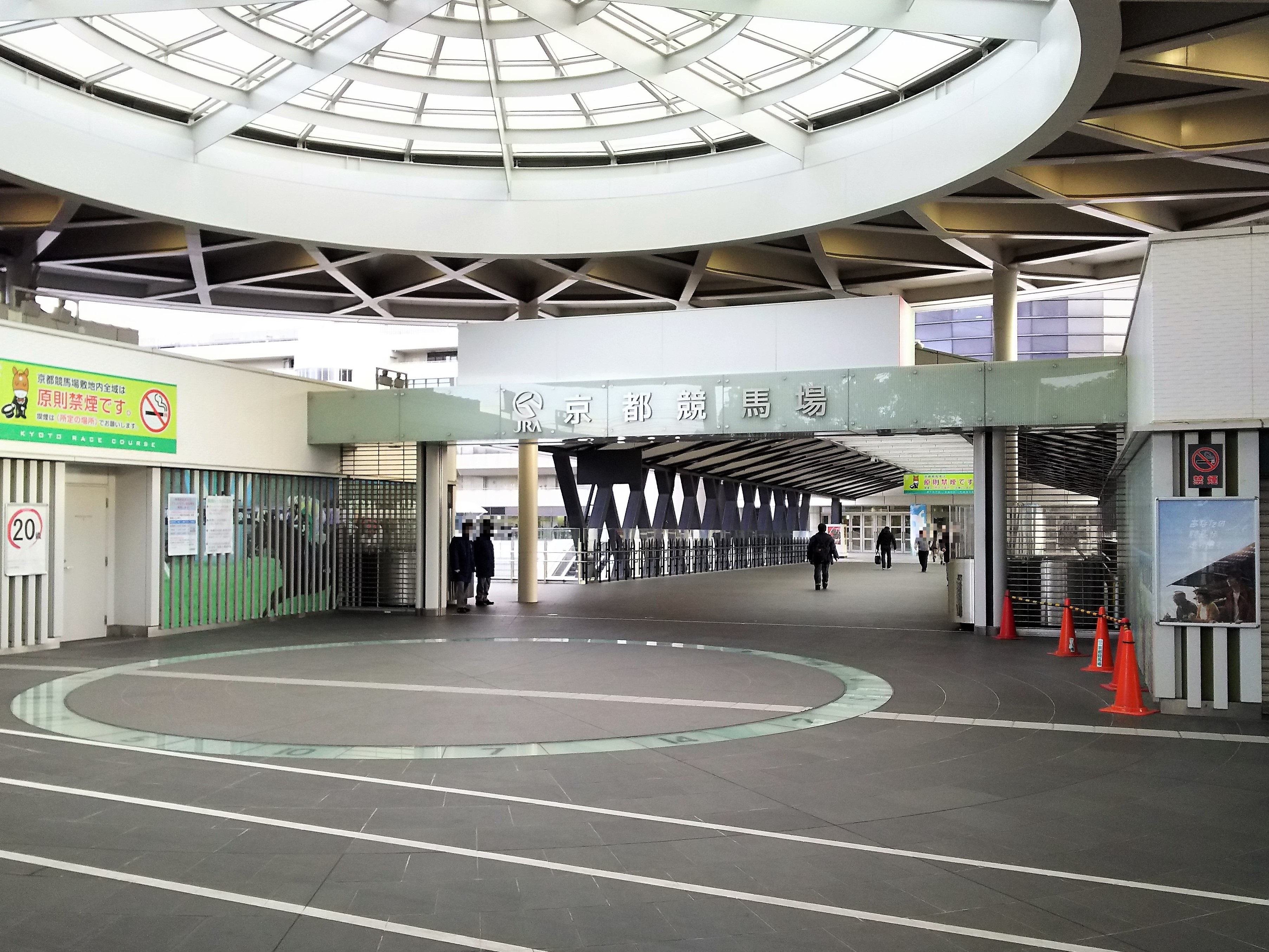 京都競馬場ステーションゲート（京都市伏見区）